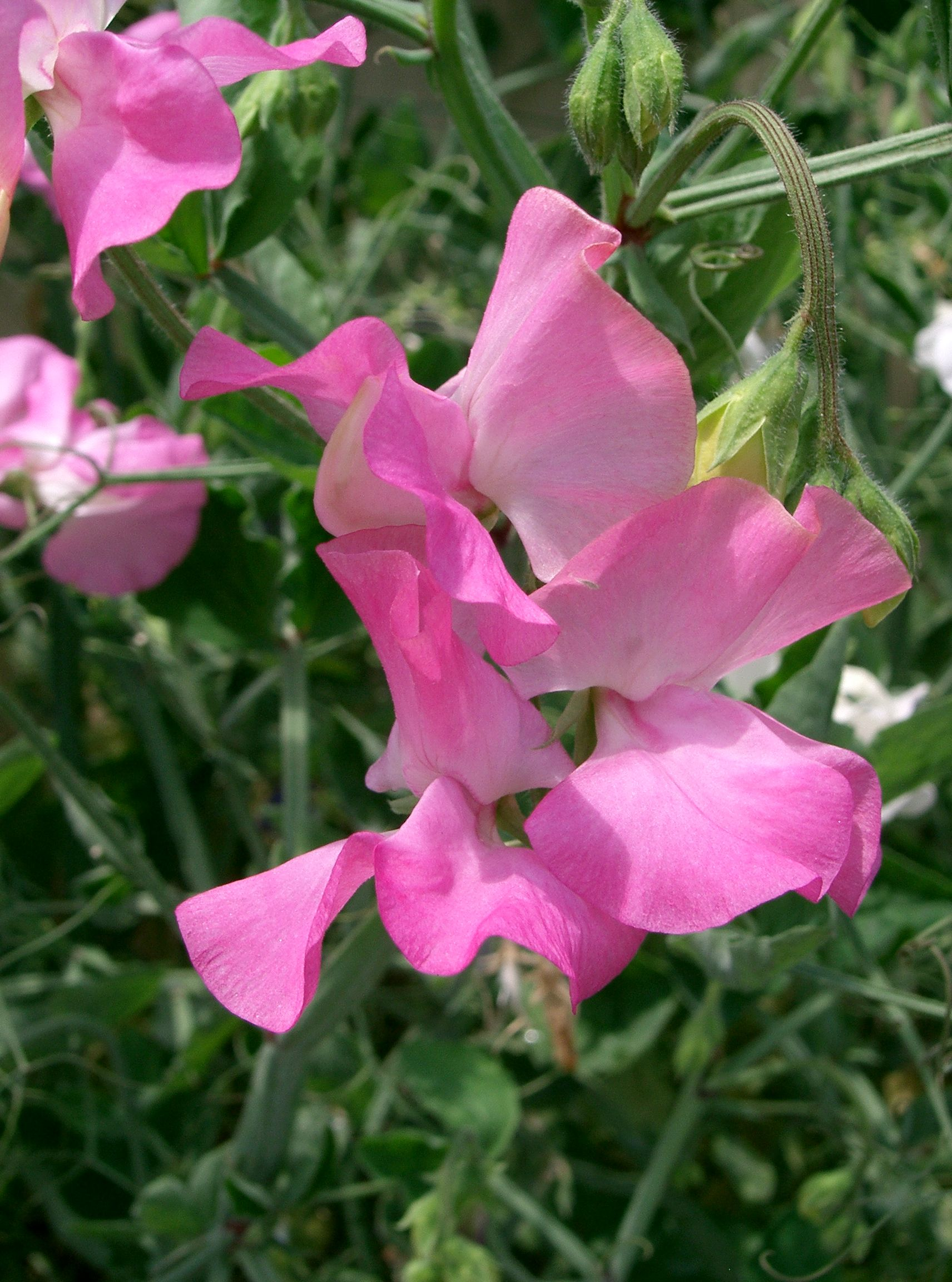 Lathyrus odoratus